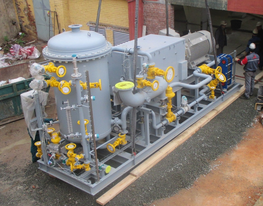 Nash liquid-ring compressor - skid unit being moved to position.